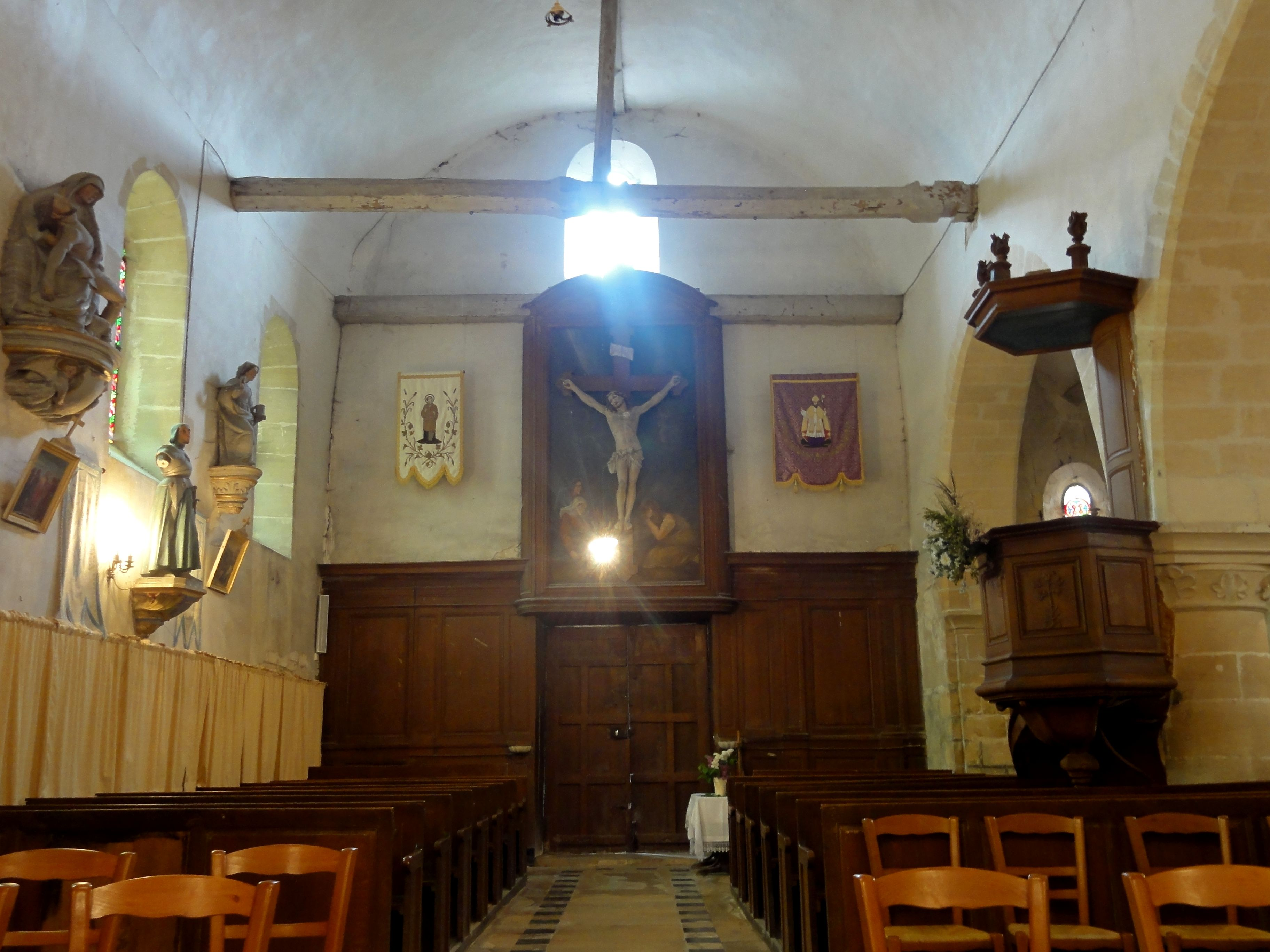 Intérieur de la nef ; vue vers le portail.